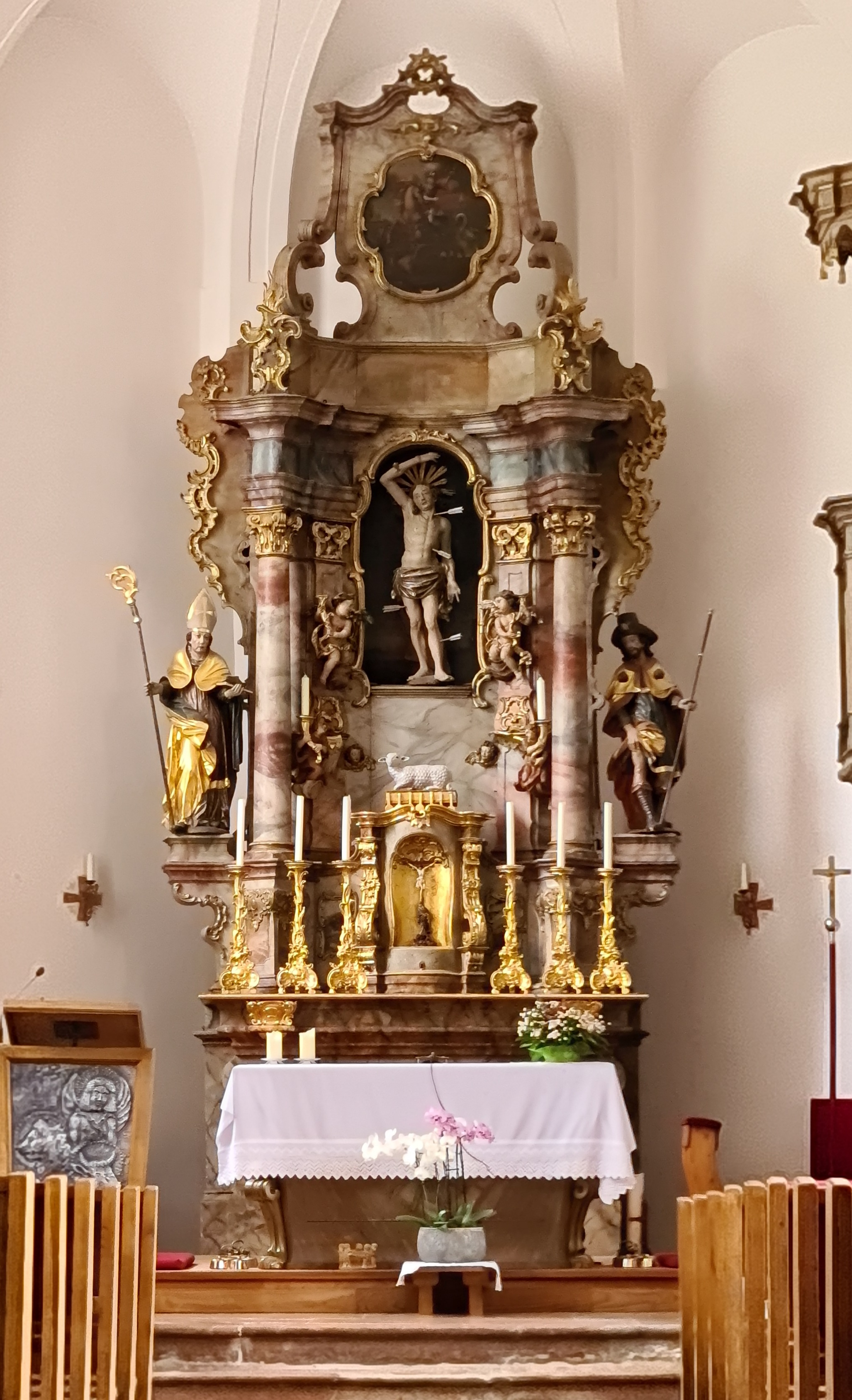 Friedburg